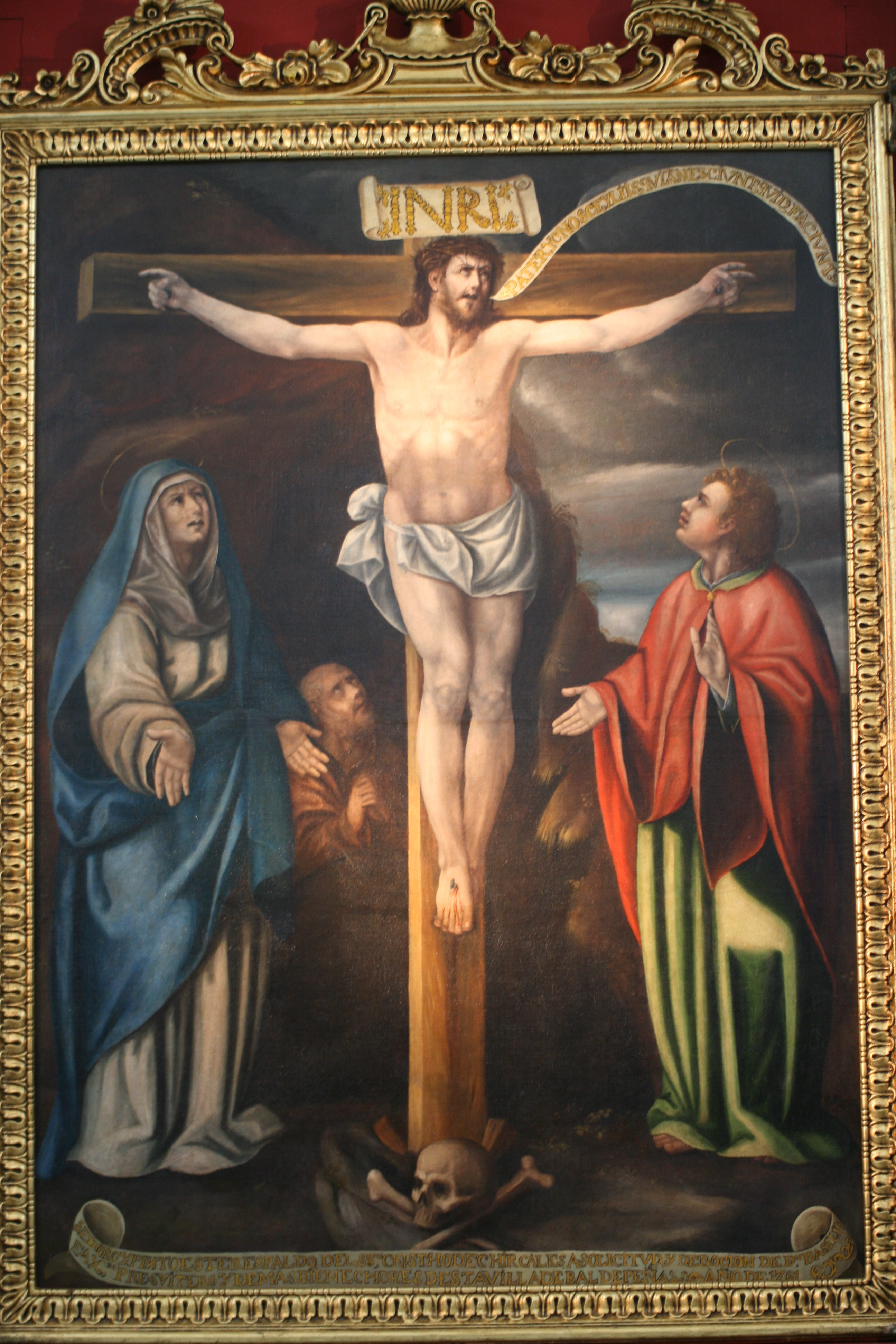 Imagen del Cristo de Chircales, pintura anónima de finales del siglo XVI.